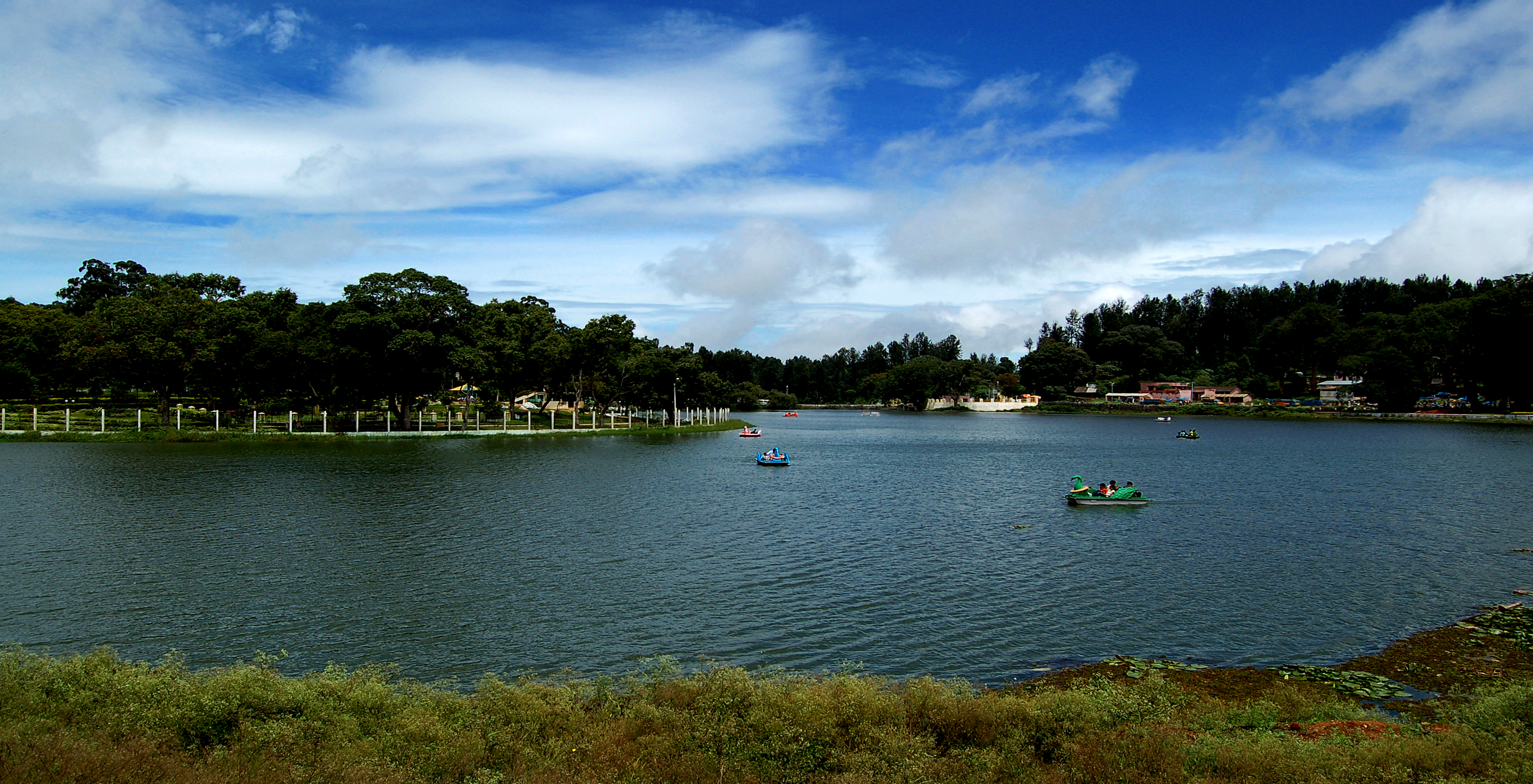 Yercaud lake